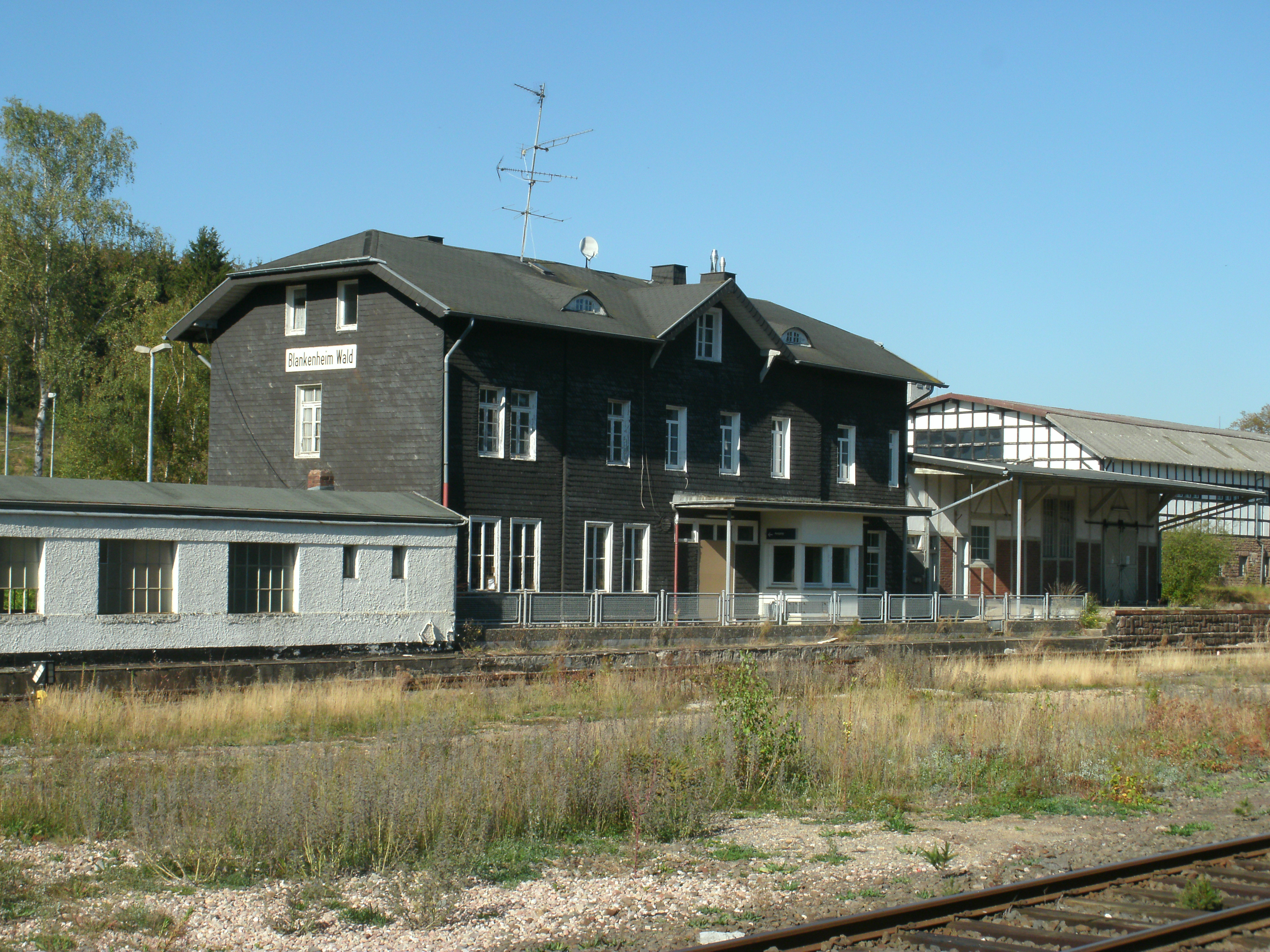 Das Empfangsgebäude des Bahnhofs Blankenheim (Wald) vom Bahnsteig aus (Gleisseite). Rechts vom Gebäude der Bahnsteigtunnel.